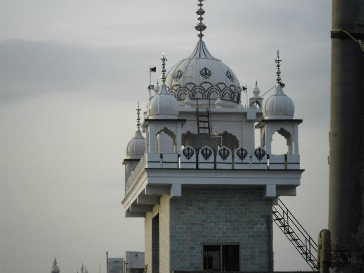 Gurudwar at Nizamabad, Andhra Pradesh